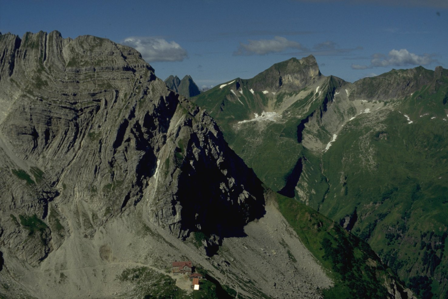 Wiedemer Kopf von Nordosten, darunter das Prinz-Luitpold-Haus.